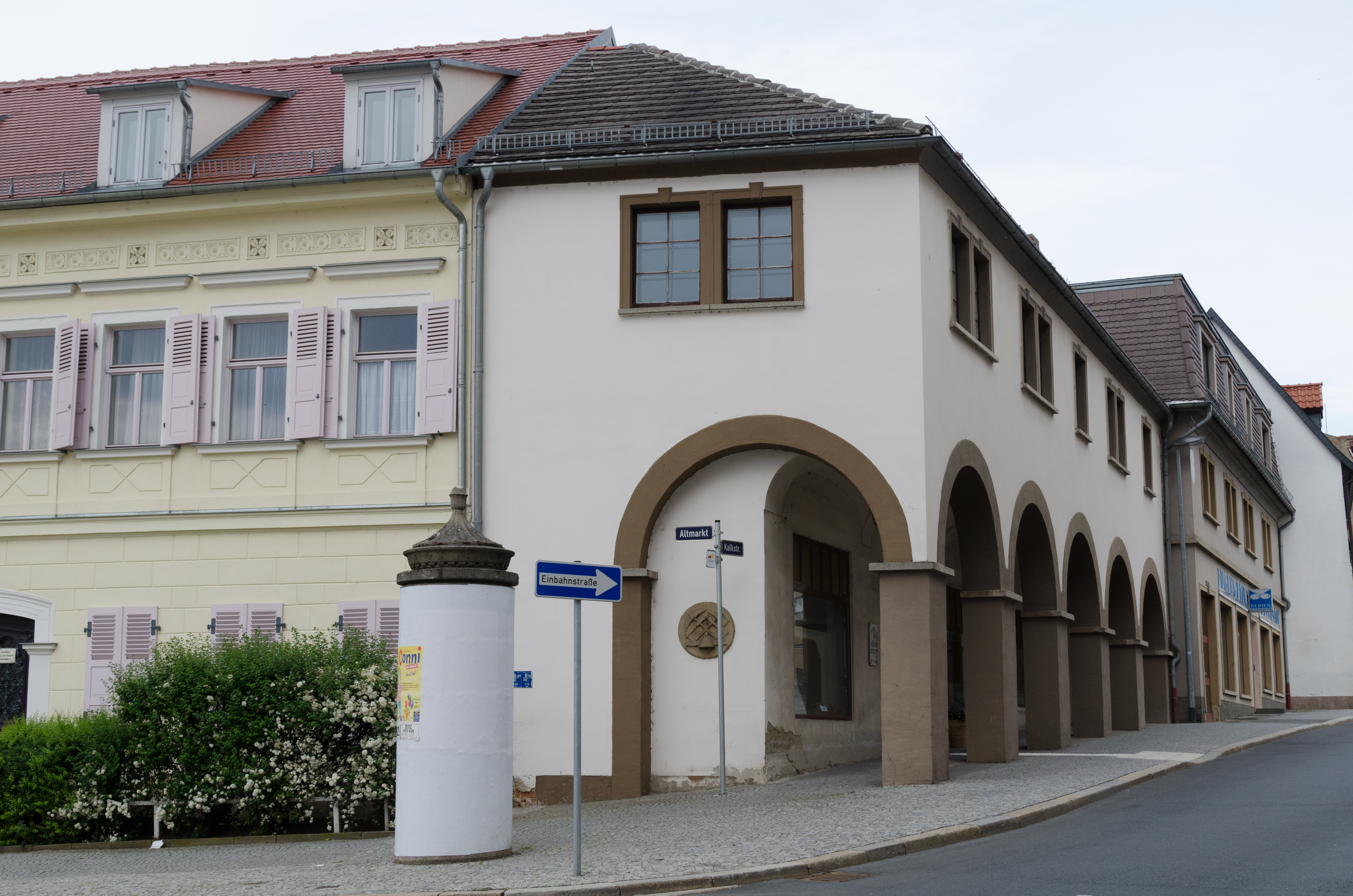 Zeitz, Altmarkt 3